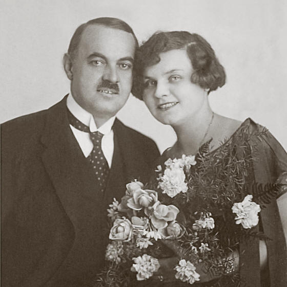 Manželé Birnbaumovi